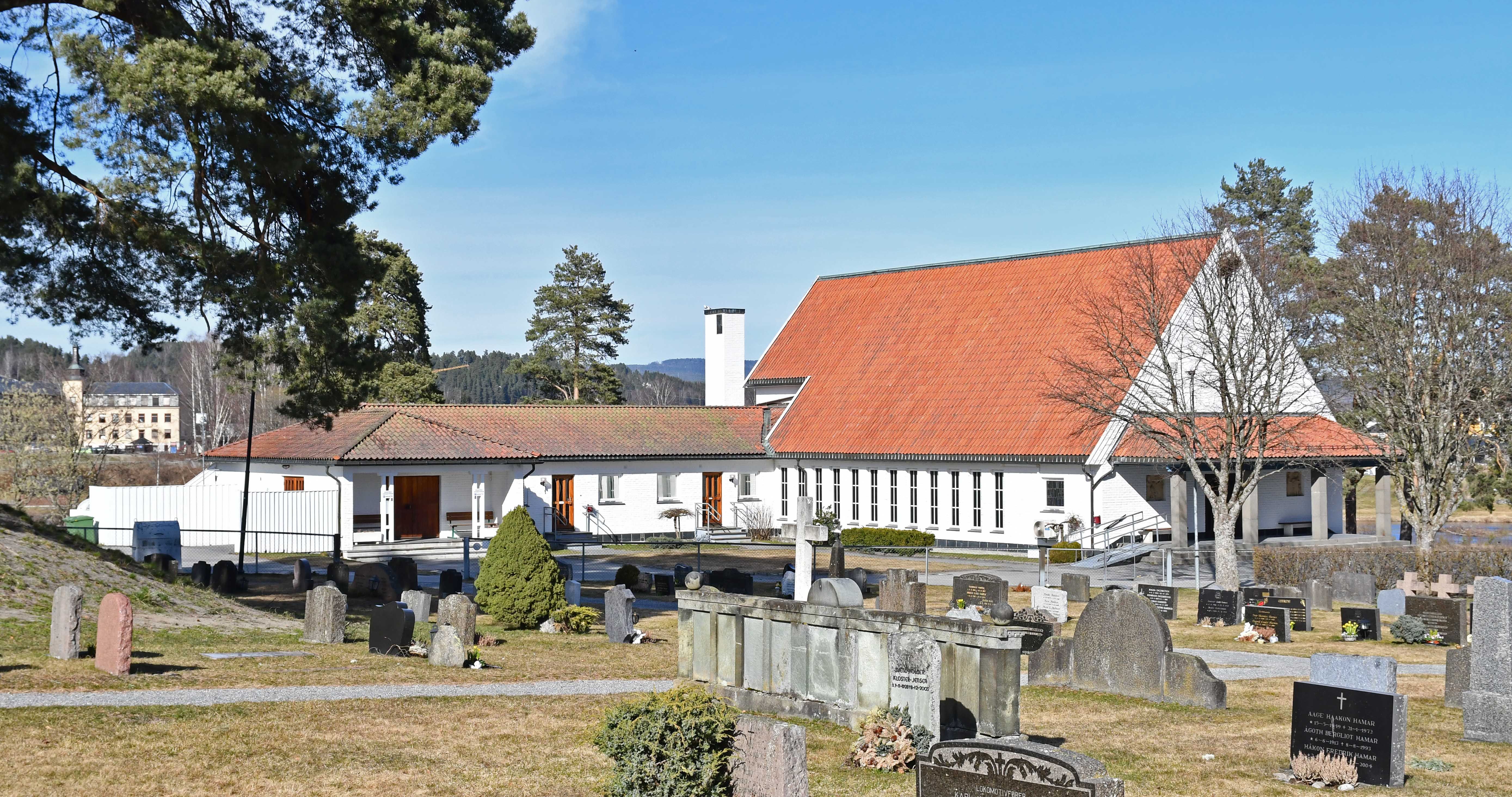 Ringerike krematorium, vigslet 1971, Hofgaards gate 14, Hønefoss, sett fra Hønefoss kirkegård